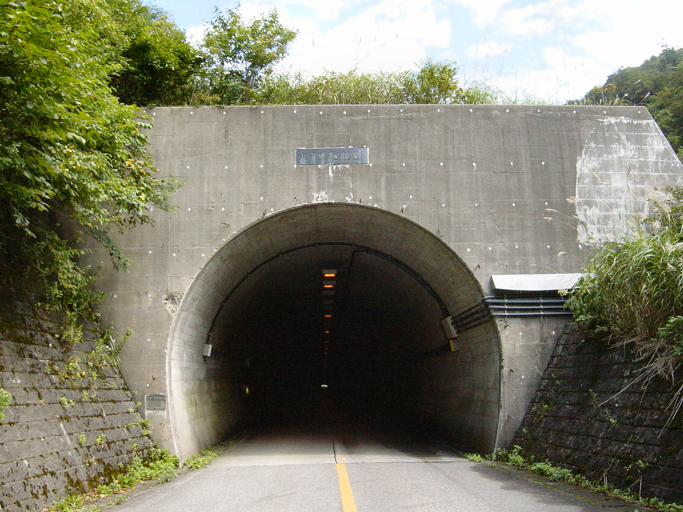 国道252号線 六十里越隧道 新潟県魚沼市側坑口